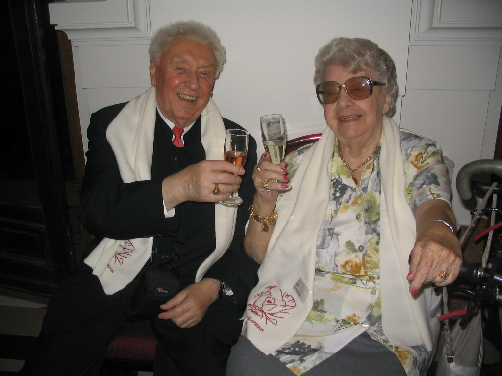 deze foto is gemaakt ter gelegenheid van de uitreiking van 'De Gouden Klaprozen 2006" in de marmeren zaal van de Dierentuin te Antwerpen. Ke Riema ontmoet Will Ferdy